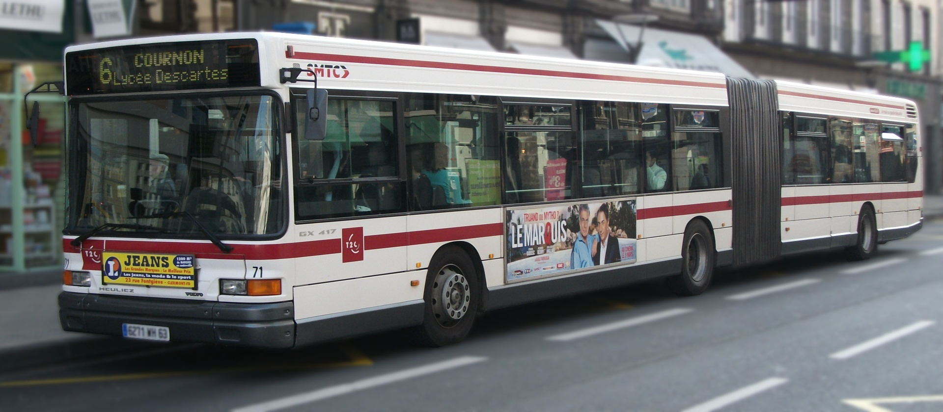 Heuliez GX 417 sur la ligne 6 en direction de Cournon Lycée Descartes, Clermont-Ferrand, Puy-de-Dôme, France. Réseau T2C, arrêt Jaude